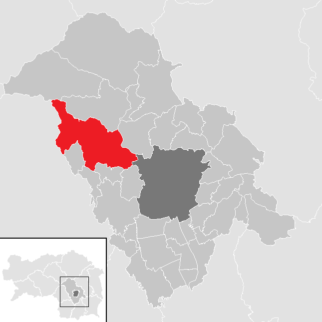 Lage von Gratwein-Straßengel im Bezirk Graz-Umgebung